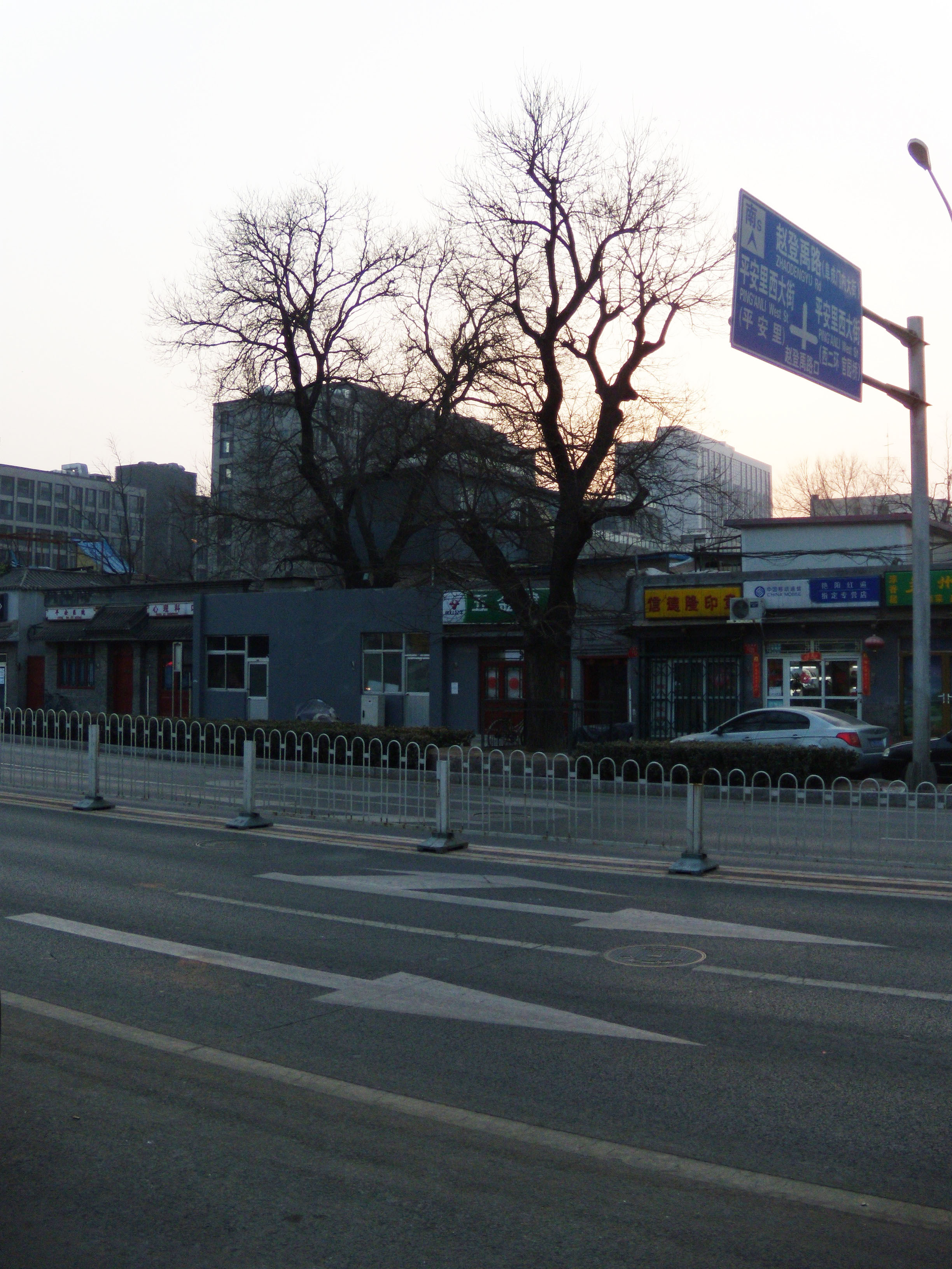 赵登禹路